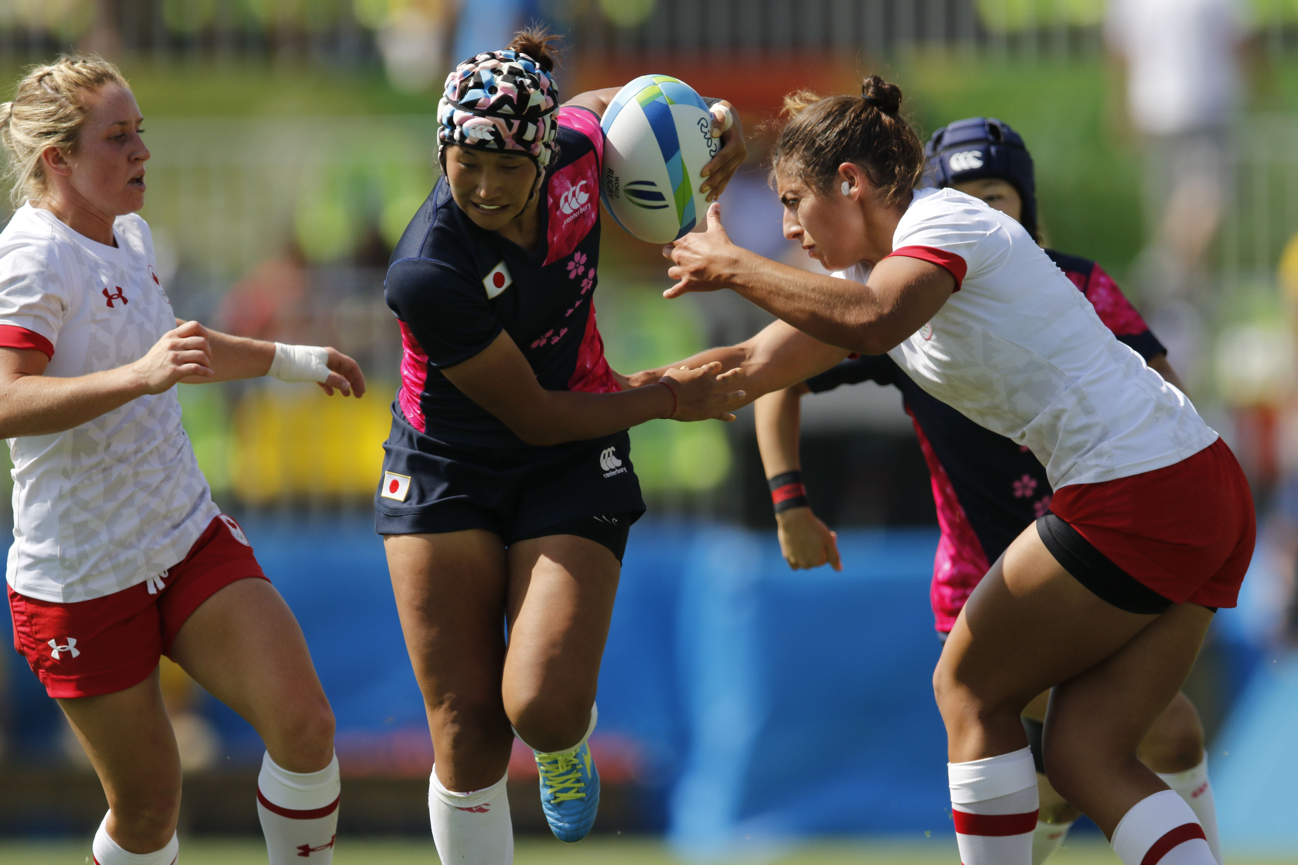 Rugby feminino: Canadá vence Japão por 45 a 0